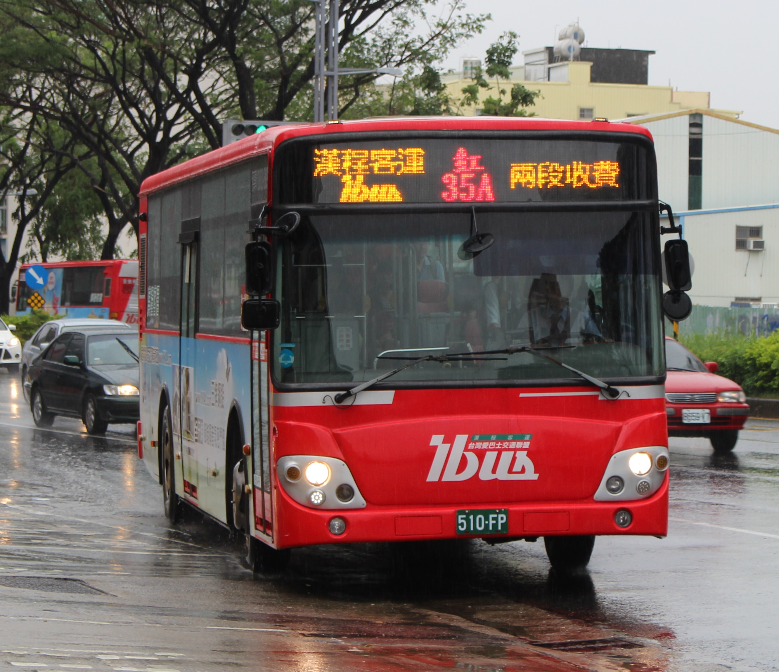 中文（台灣）: 漢程客運大宇BC211M低地板公車510-FP，雨中行駛高雄市公車紅35A線。